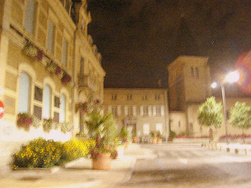 Place Léon Sublet, Vénissieux